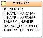 Data model diagram picture of an EMPLOYEE database table